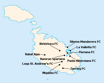 Répartition des clubs en Premier League Maltaise 1991-1992.